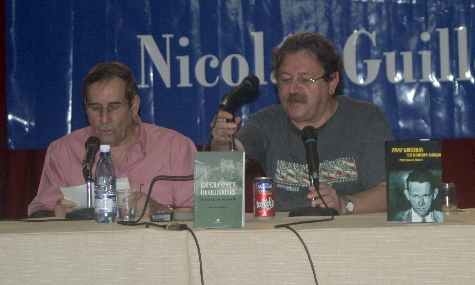 Bei der 18. Internationale Buchmesse in Havanna, stellt der mexikanische Krimiautor Romancier und nicht zuletzt Ché-Biograf Paco Ignácio Taibo II (im Bild rechts) sein neues Buch vor. »Un hombre Guapo« handelt von dem historischen Studentenführer im Kuba vor der Revolution Tony Guiteras.